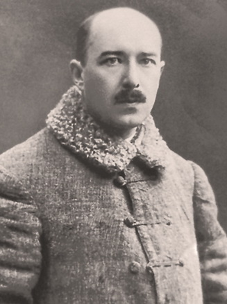 Антон Луцкевіч, беларускі палітычны і грамадскі дзеяч, публіцыст, літаратурны крытык, гісторык, лінгвіст, выдавец.